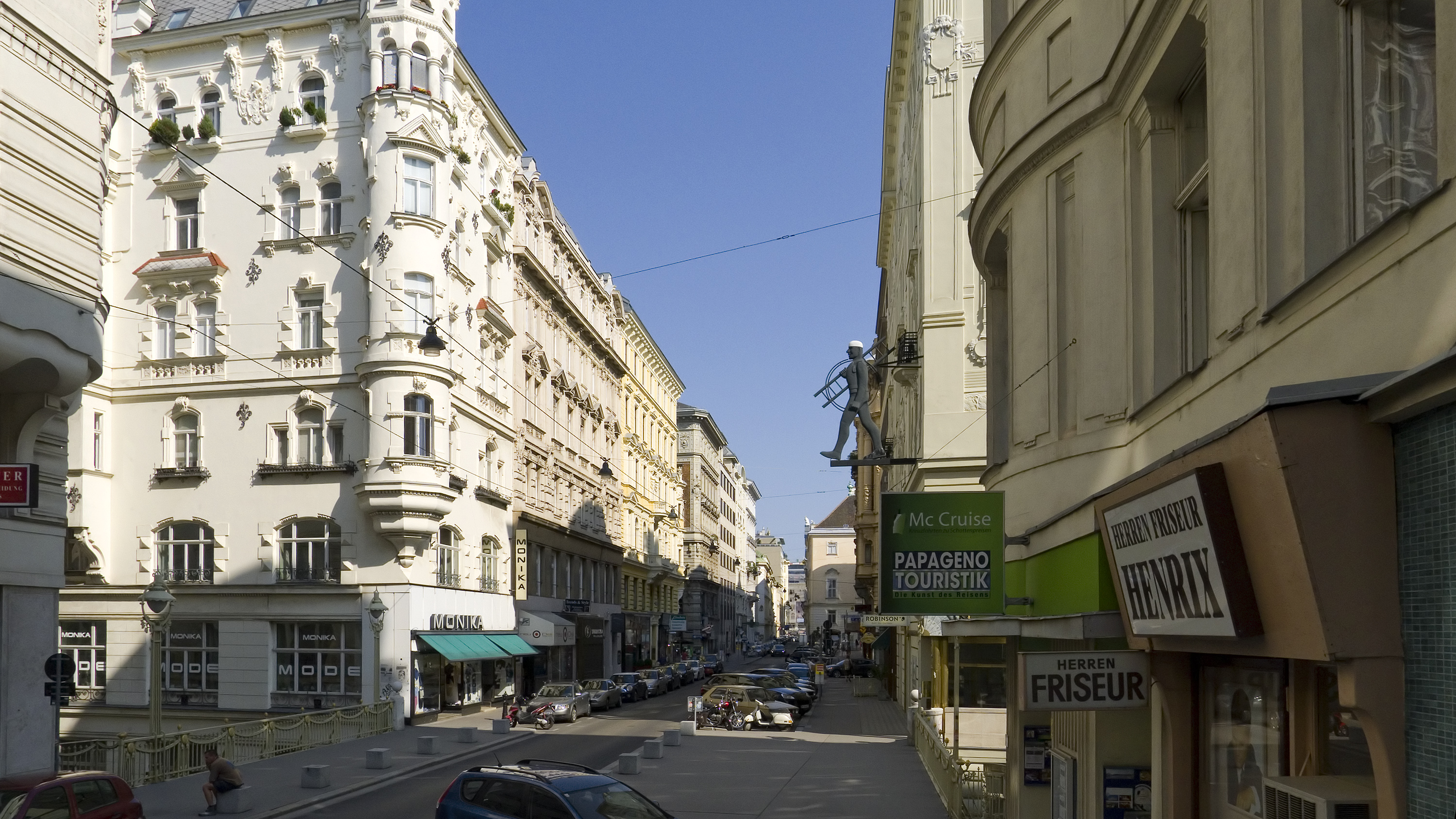 Wipplingerstraße in Wien 1 bei Nr. 23 Richtung Südosten